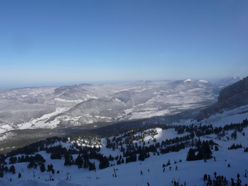 Le Vercors